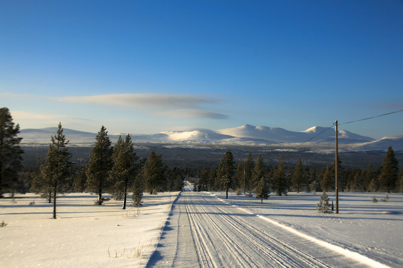 Jonasvollvegen/Tufsingdalen